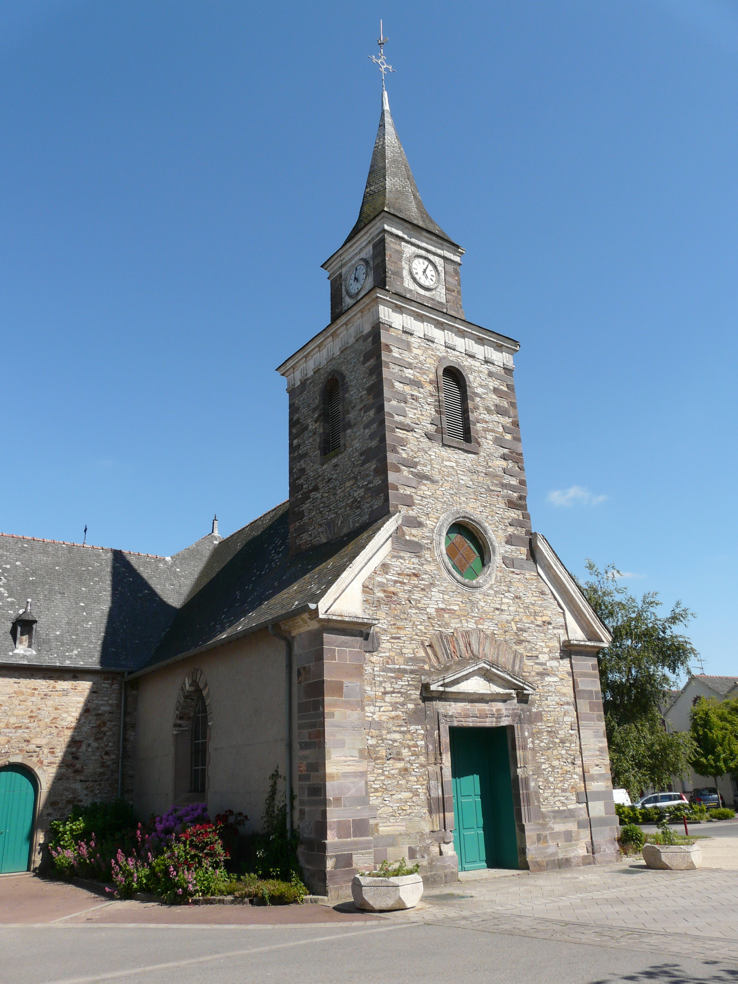 Vue d'ensemble de l'église d'Avessac